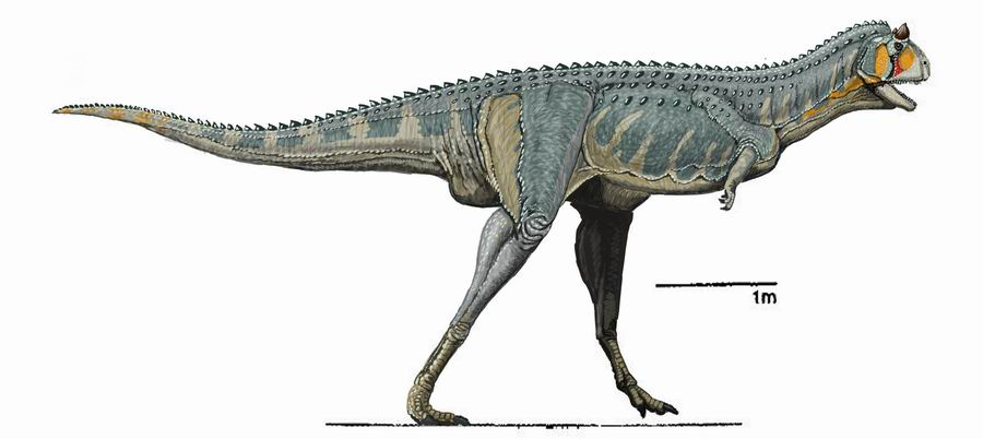 Carnotaurus - reconstruction autor - Bogdanov